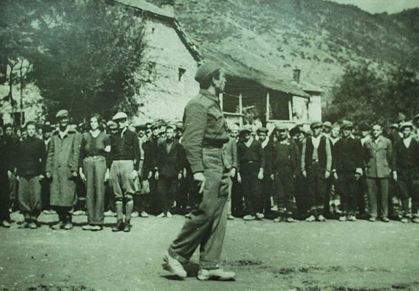 Петре Пирузе - Мајски, командант на II оперативна зона, говори пред борците во село Велмеј, Дебарца, 1944 година